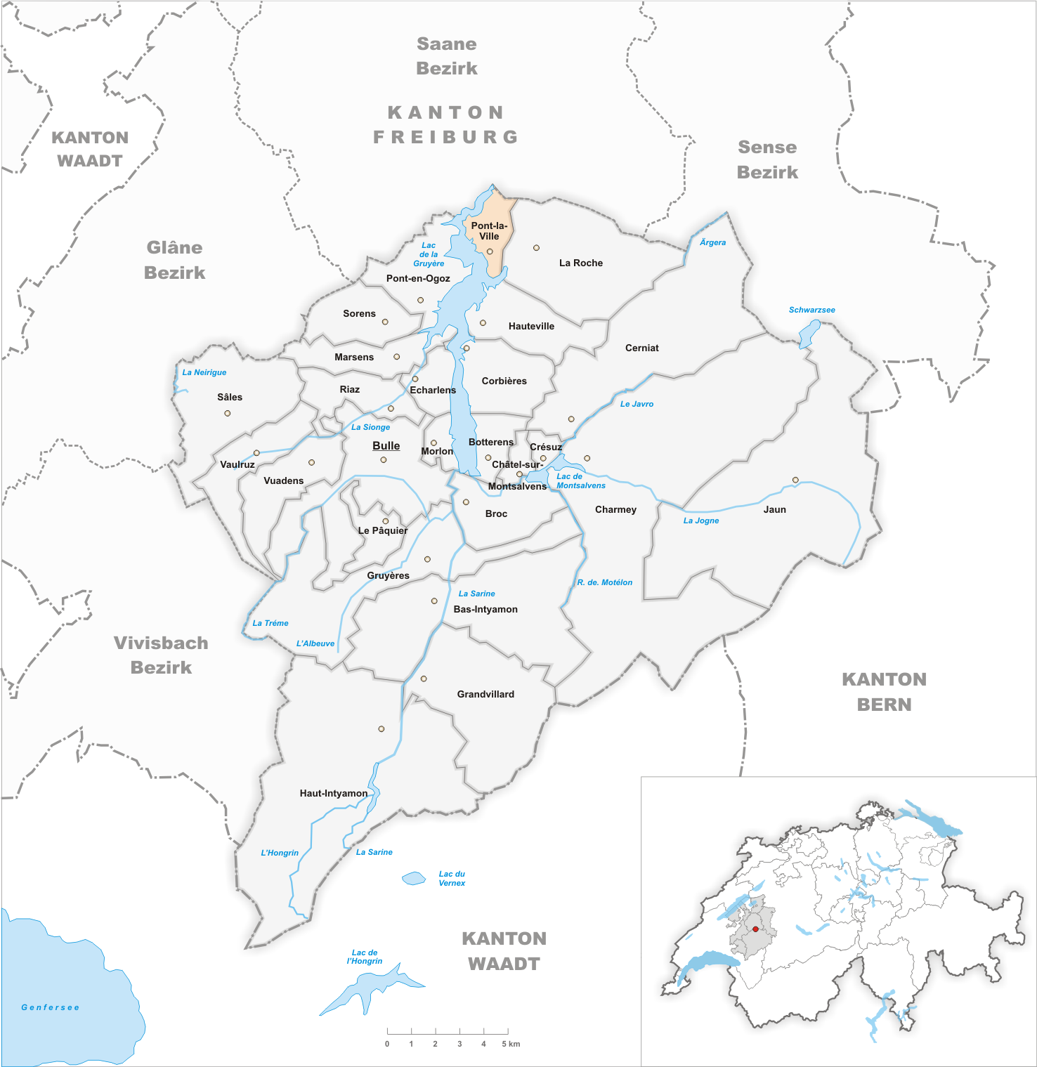 Municipality Pont-la-Ville